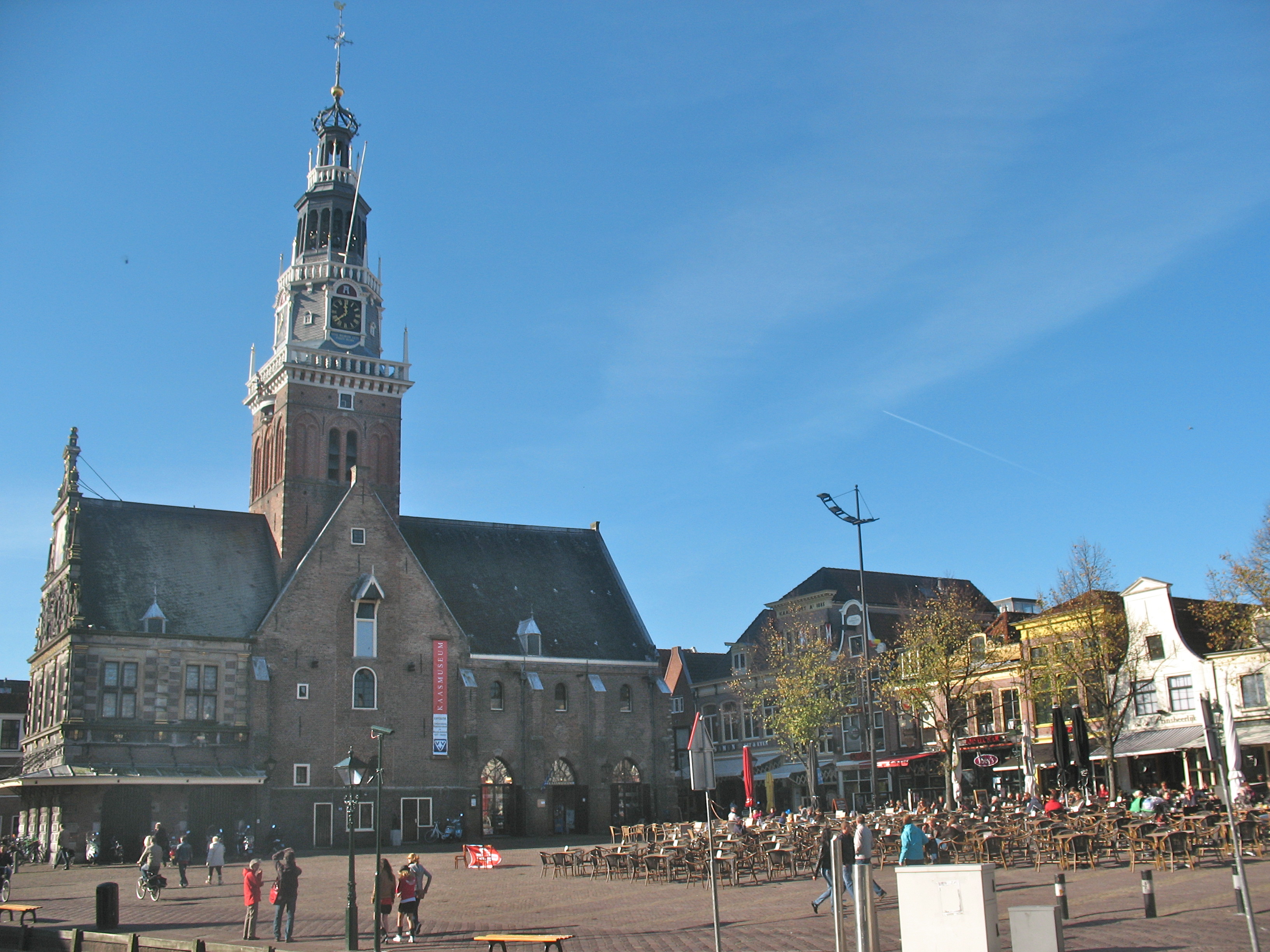 Alkmaar - Waagtoren en Waagplein